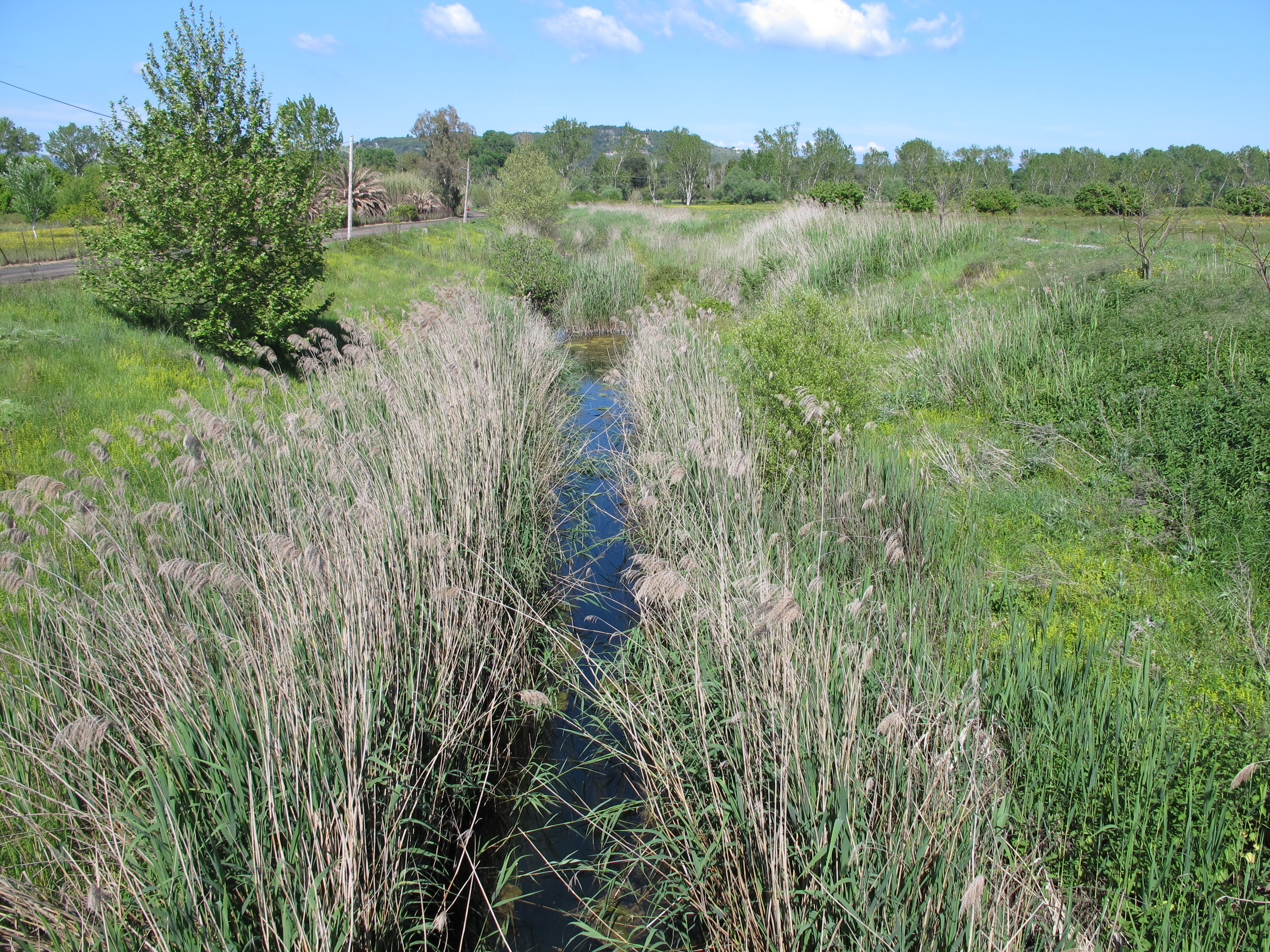 Der Ropa nahe der Mündung bei Ermones im April 2017